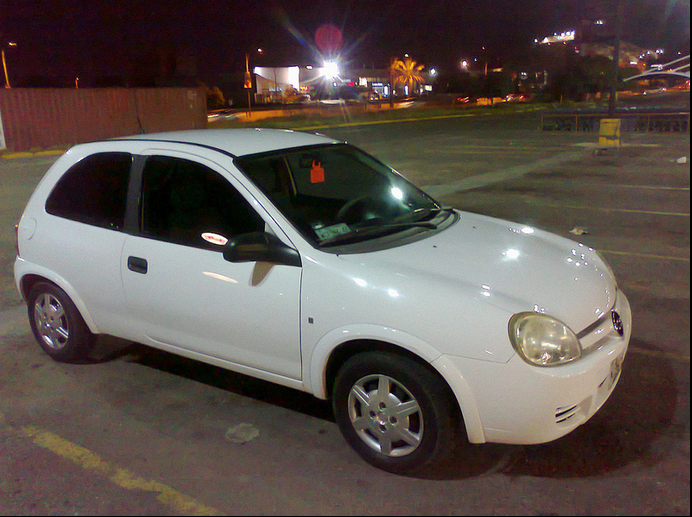 Chevy C2 2008. Versión 3 puertas, paquete "M".